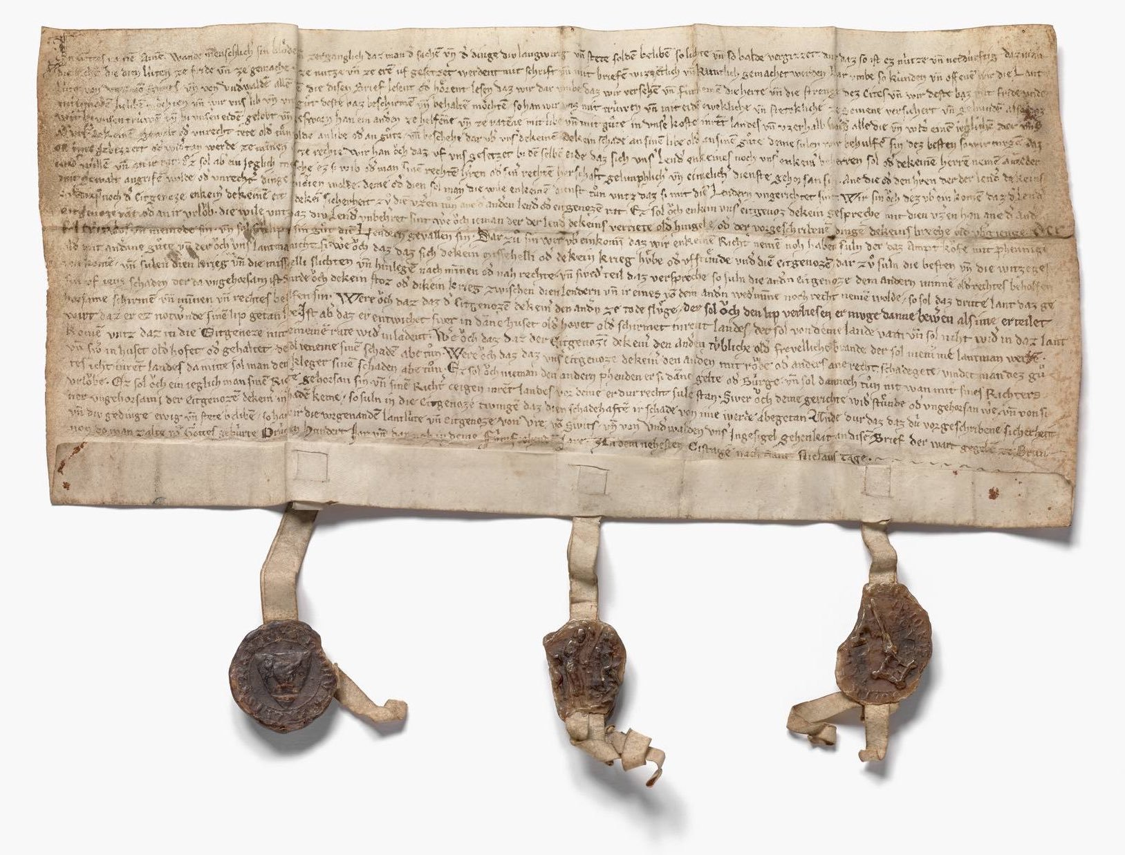 Morgartenbrief